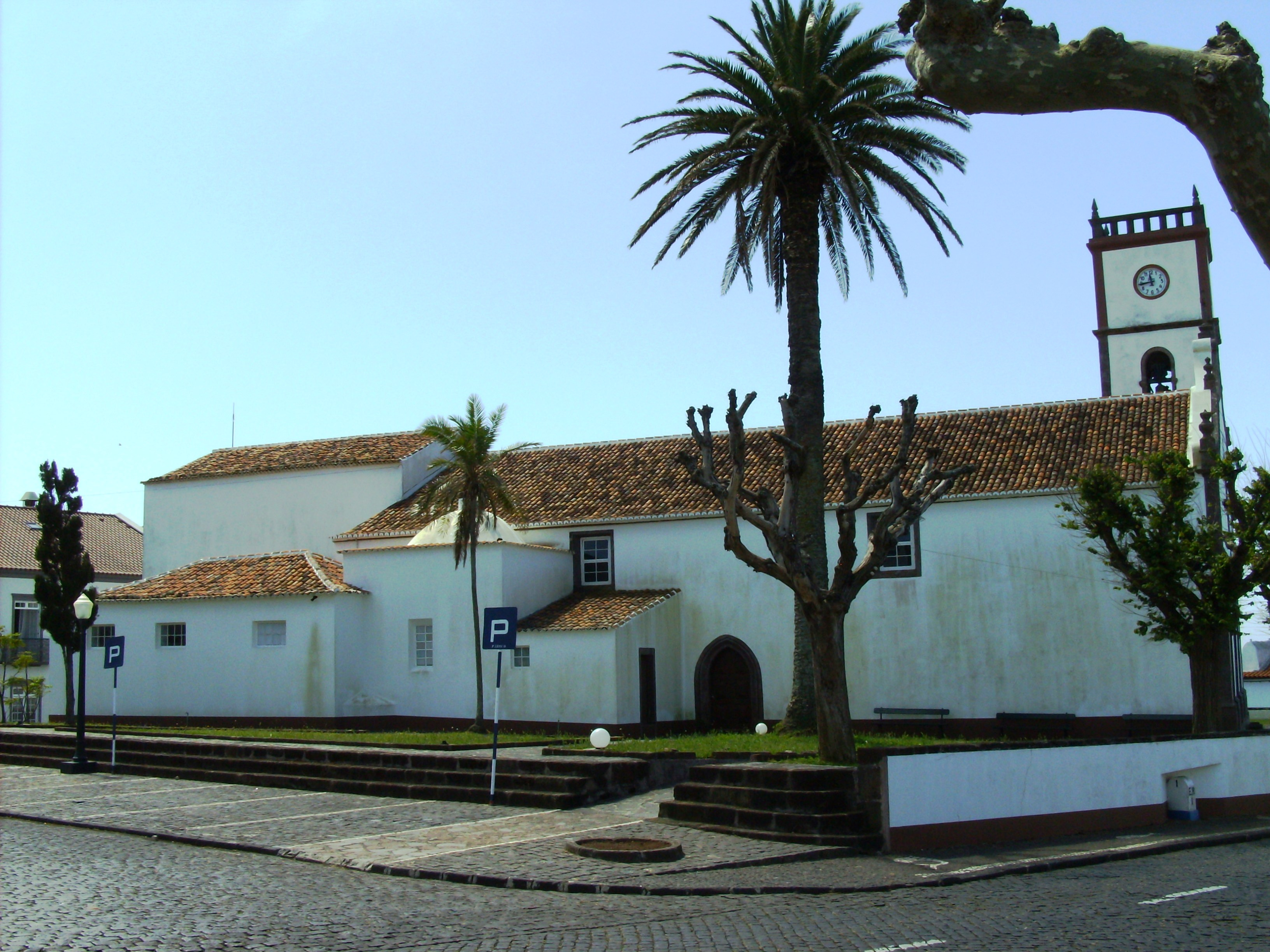 Igreja Matriz de Nossa Senhora da Assunção, Ilha de Santa Maria (Açores), Portugal.